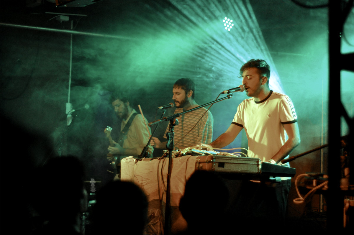 El Guincho durante una presentación en Lima, Perú (2016)